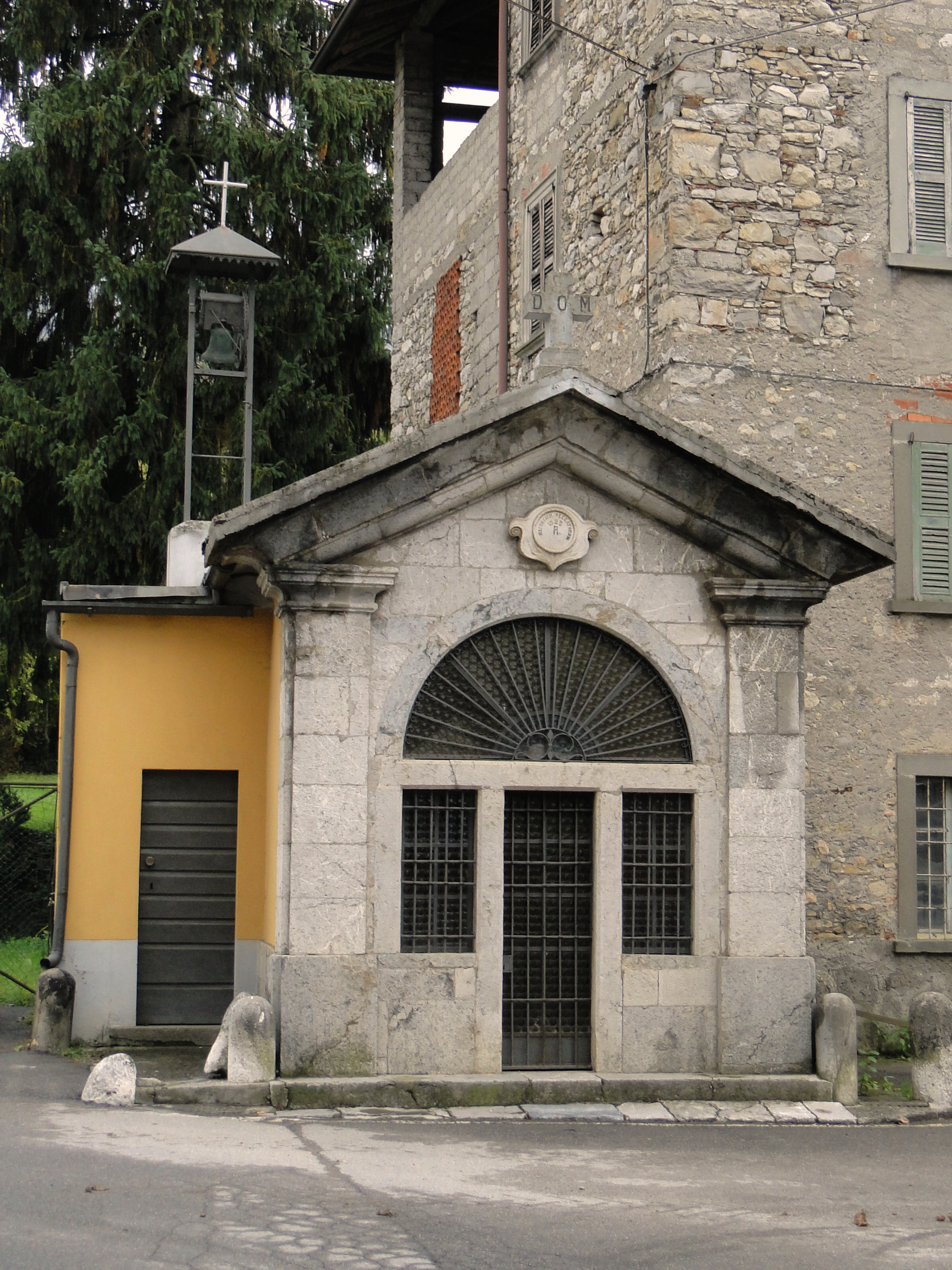 Abbazia, fraz. di Albino (BG). Località Tribulina